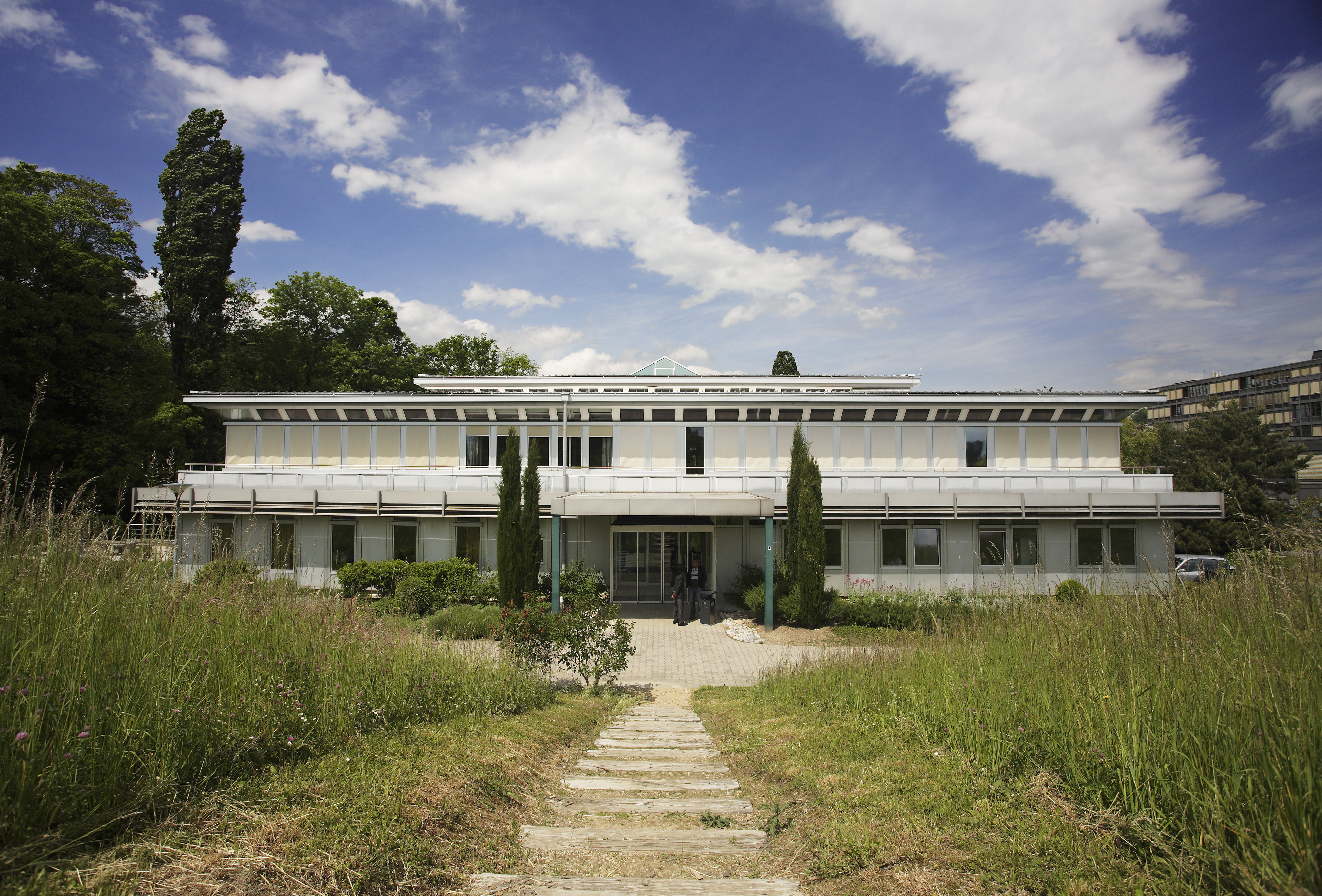 Vue extérieure de l'Institut suisse de droit comparé